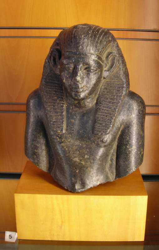 buste de pharaon, Moyen Empire